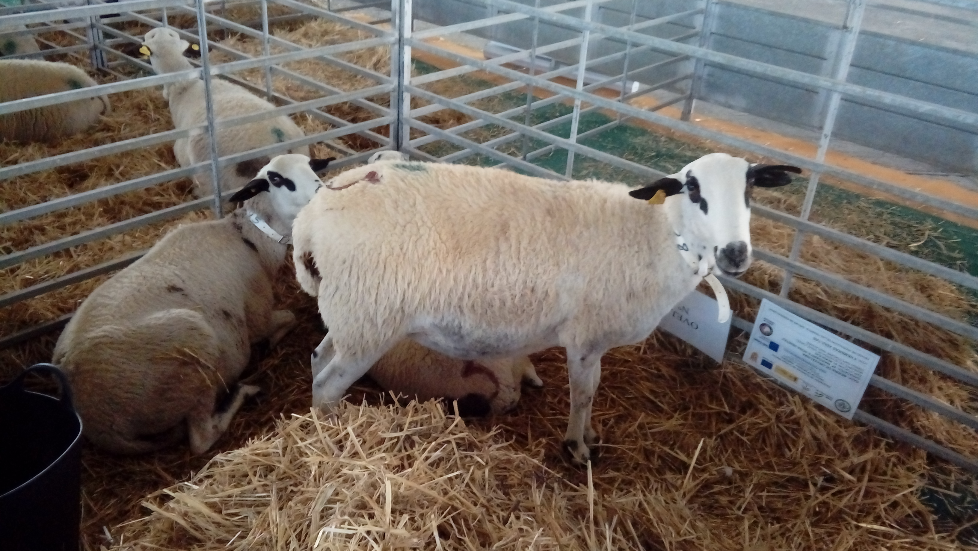 Ejemplares de oveja montesina en FEGASUR 2016, Jerez de la Frontera (Cádiz).